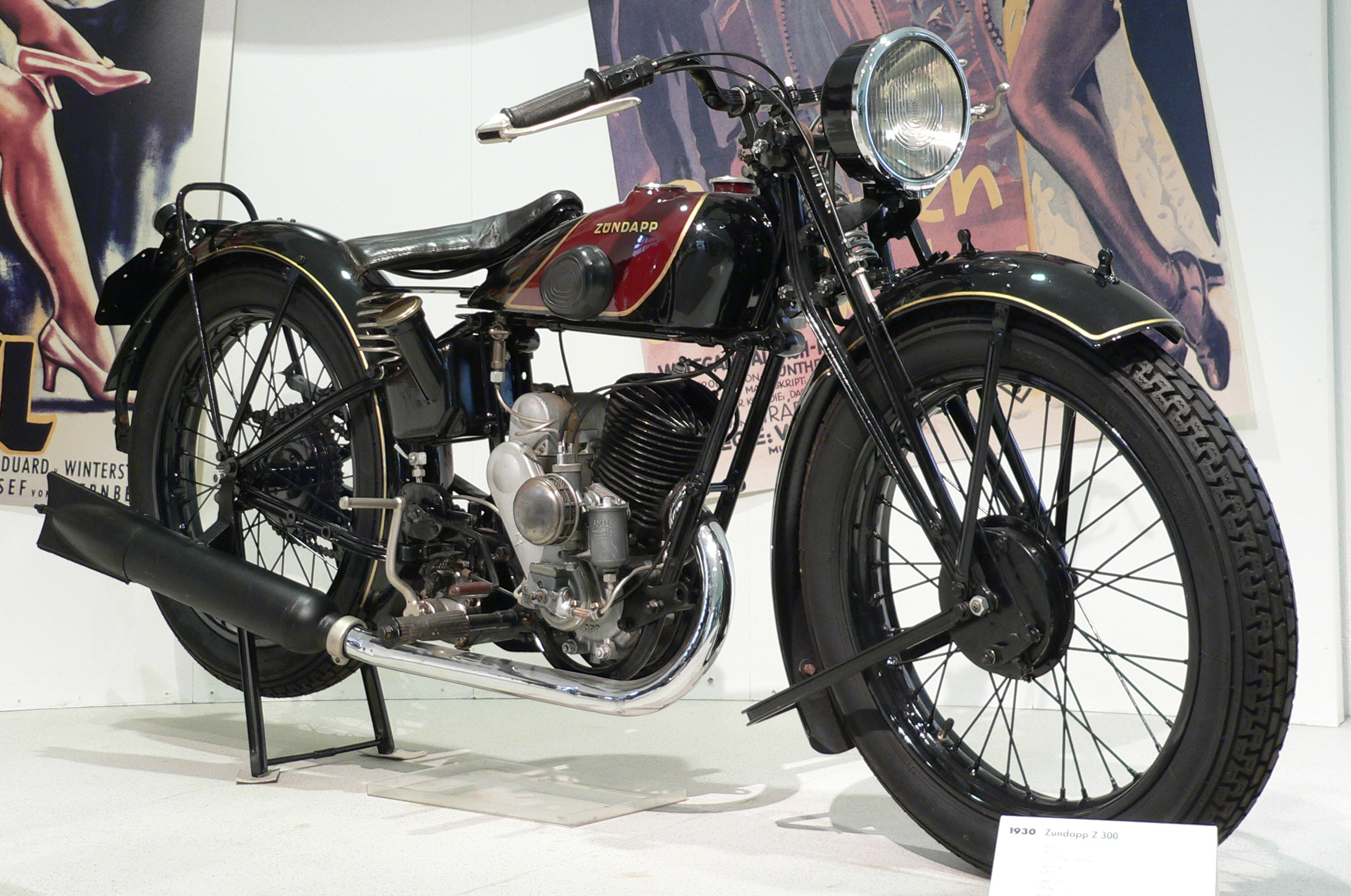 Motorbike "Zündapp Z300" (1930) at the Deutsches Zweirad- und NSU-Museum (297 cm³, 9 PS, 95 km/h)